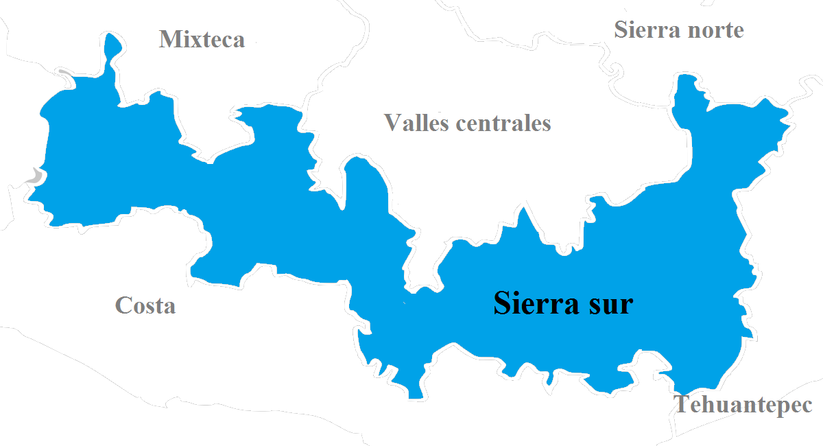 Región Sierra Sur, una de las ocho regiones que conforman al estado mexicano de Oaxaca.